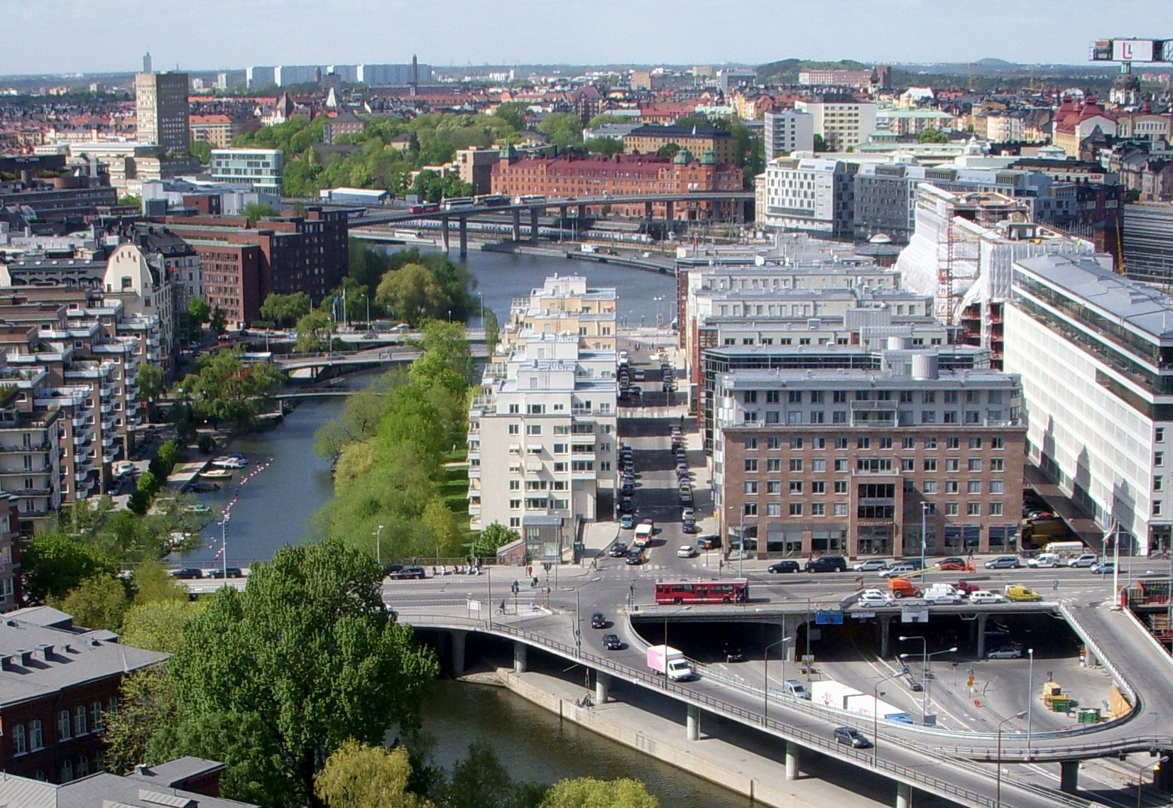 Blekholmen sedd från Stadshustornet mot norr. Dessutom syns Barnhusviken, Barnhusbron, Bonnierhuset, Kungsbron, Blekholmsterrassen, södra infarten till Blekholmstunneln och Klarabergsviadukten samt Klara sjö